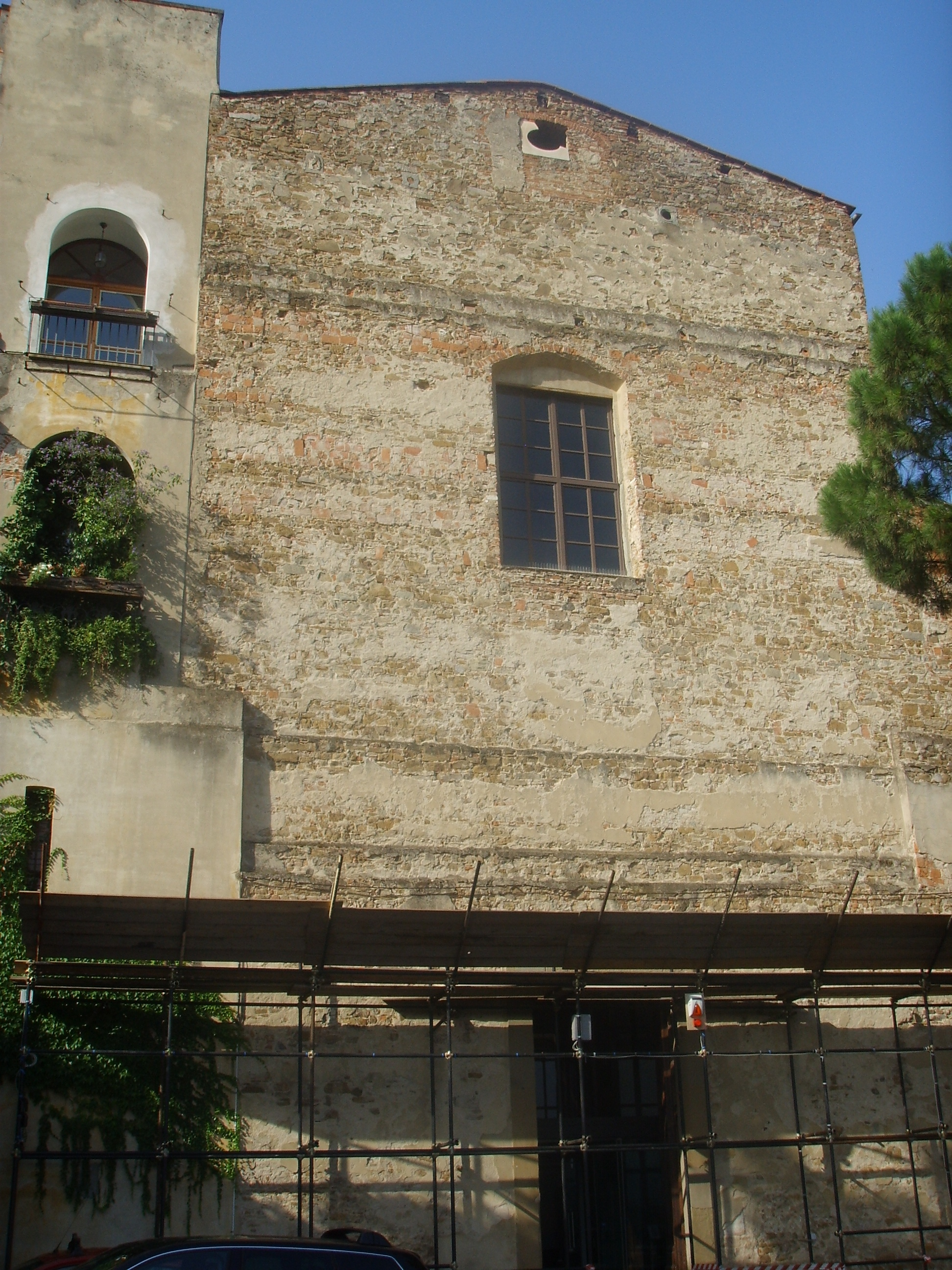 Santi_Agostino_e_Cristina in Florence, Italy